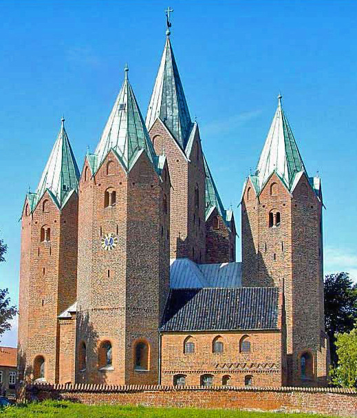 Kalundborg fra øst